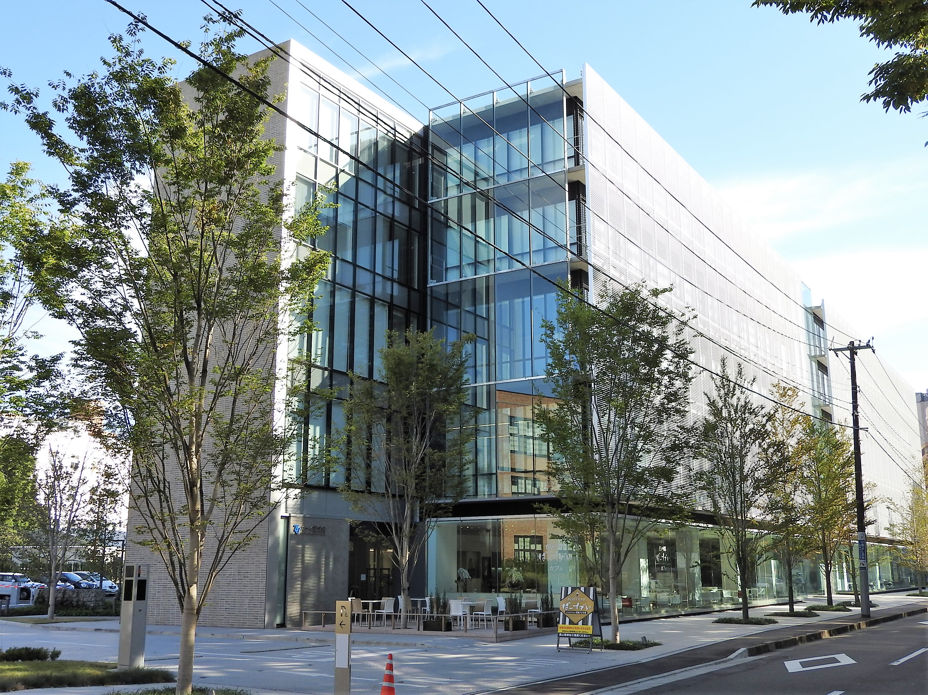 東北学院大学ホーイ記念館